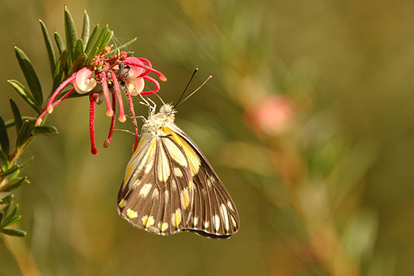 Caper White (Belenois java)